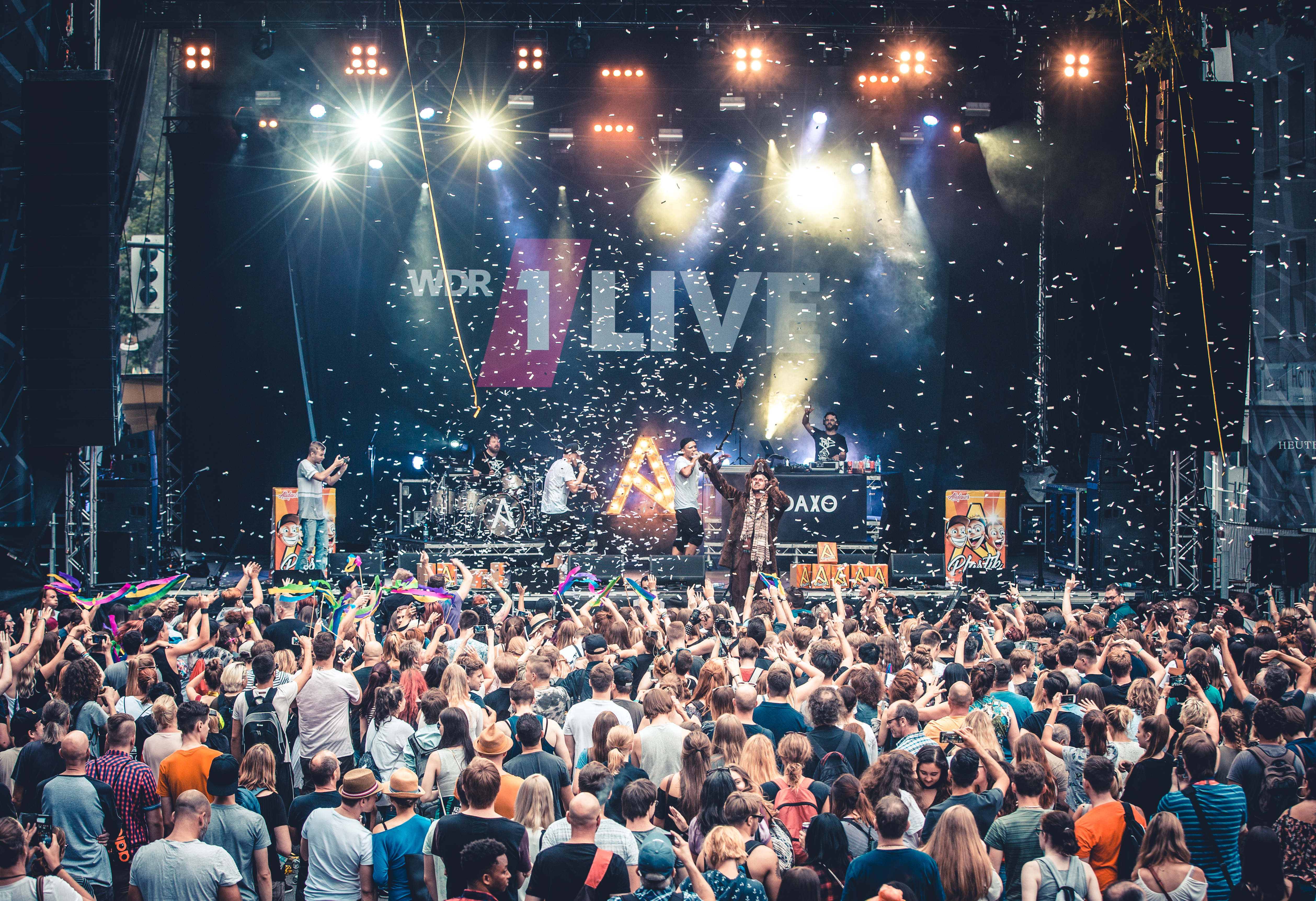 Alidaxo live bei ihrem Konzert bei Bochum Total 2017